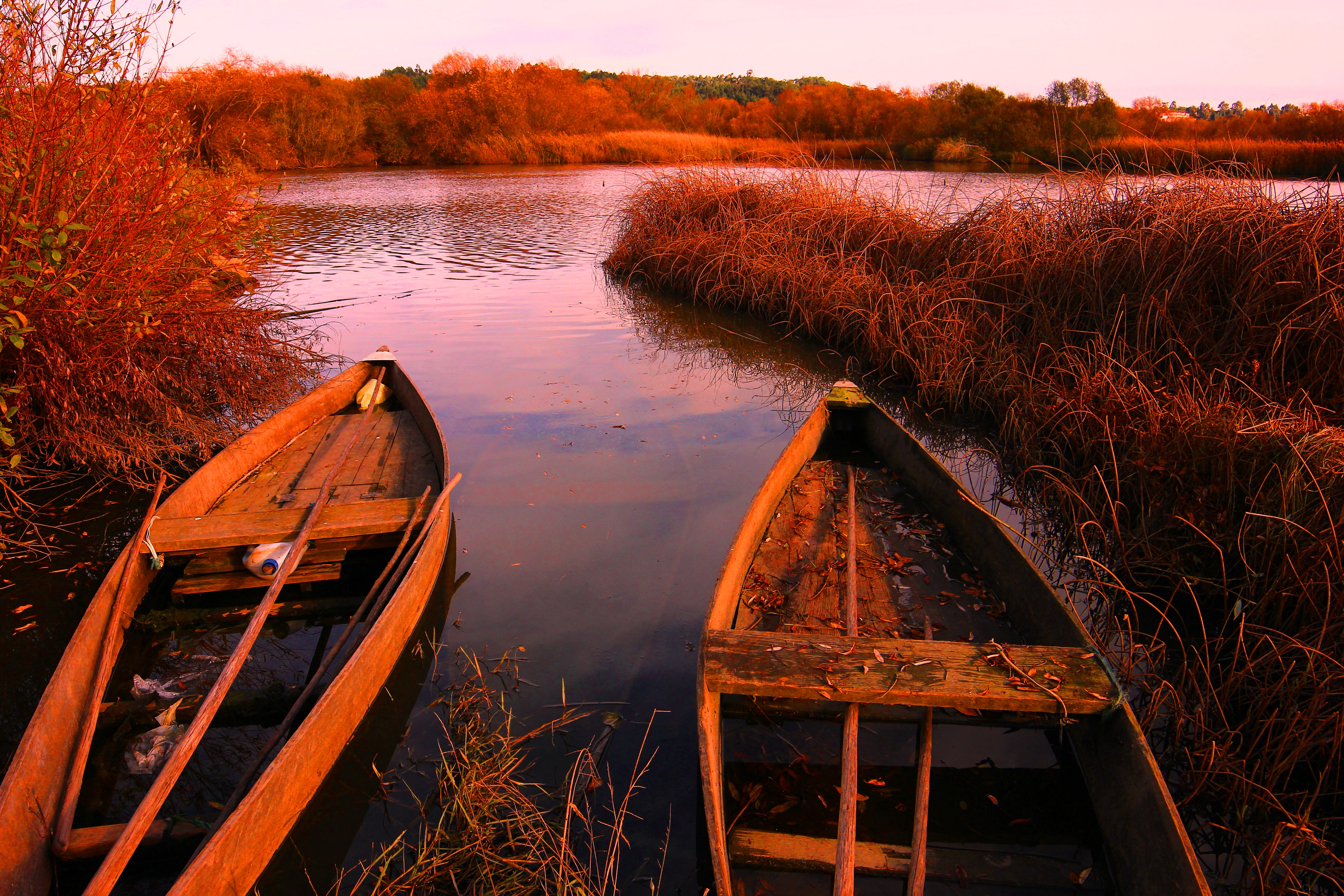 Pateira de Fermentelos Lake and Águeda and Cértima Valleys This is a photography of a protected area of Portugal indexed in the World Database on Protected Areas with the ID: 555555593 (WDPA)